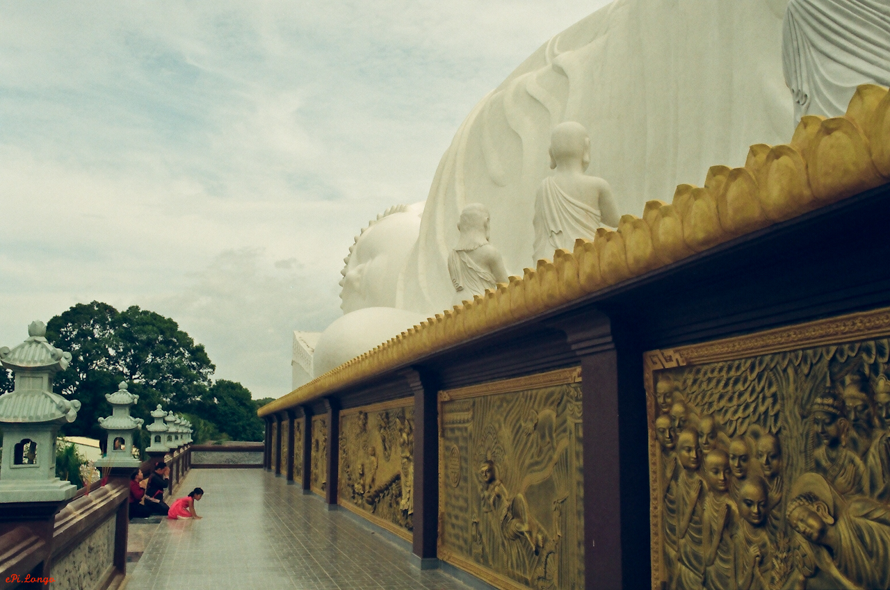 Tượng phật nằm tại chùa Hội Khánh, Bình Dương, Việt Nam